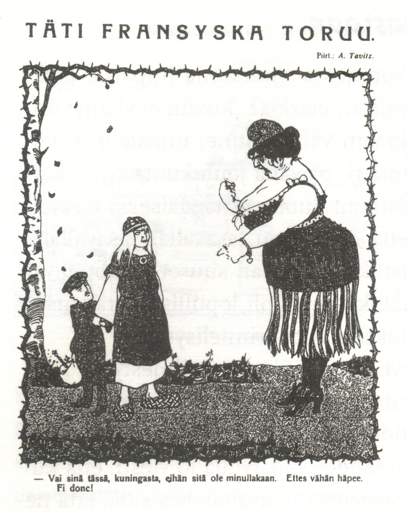 Suomen kuningaskuntahanke on kaatunut, mutta Suomi-neito pitää vielä kiinni kuninkaaksi valitusta Hessenin prinssi Friedrich Karlista tasavaltaisen Ranskan paheksunnasta huolimatta. Julkaistu pilalehti Tuulispäässä.